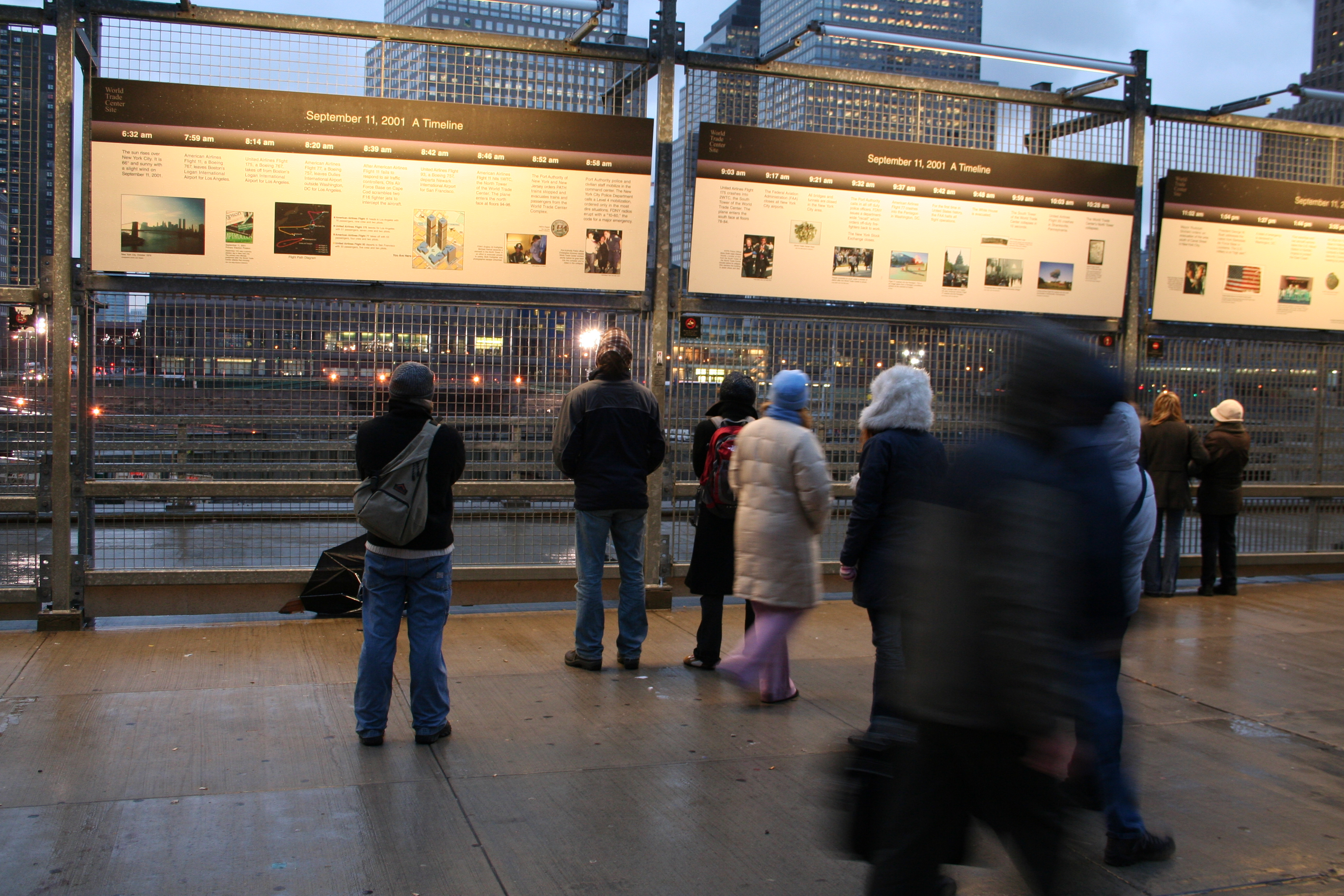 El World Trade Center en diciembre de 2005 Ground Zero, World Trade Center Site, December 2005 Photographed by and copyright of (c) David Corby (User:Miskatonic, uploader) 2006